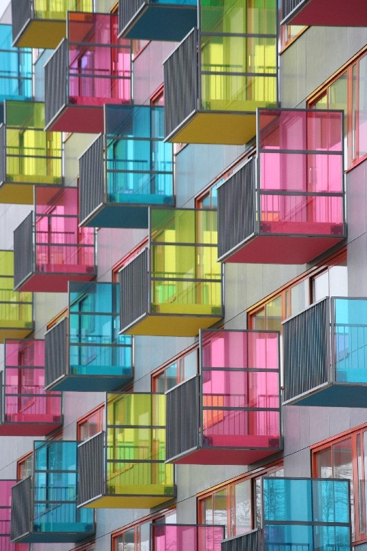 Woonflat aan het winkelcentrum Bachplein